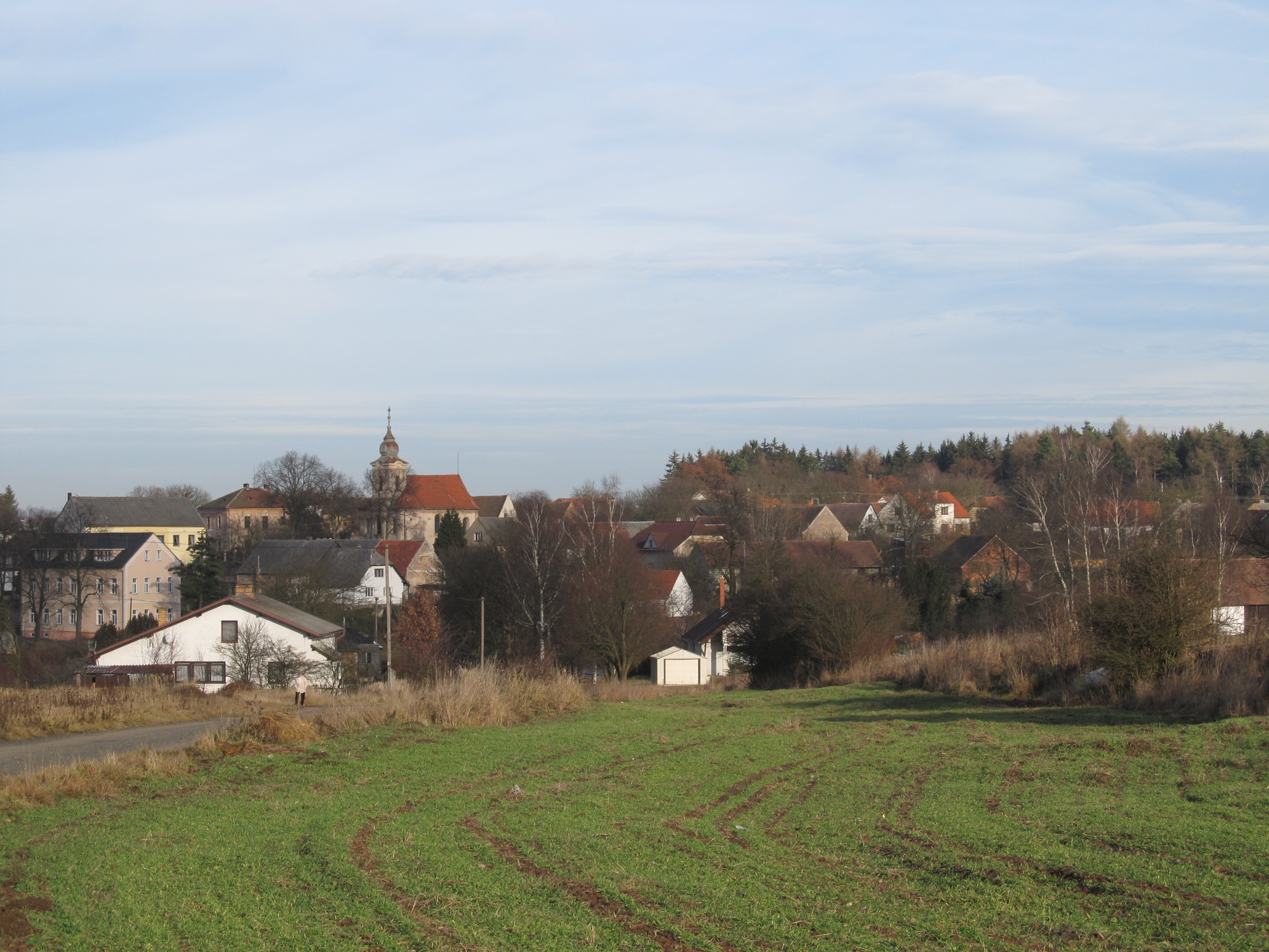 Újezd u Svatého Kříže